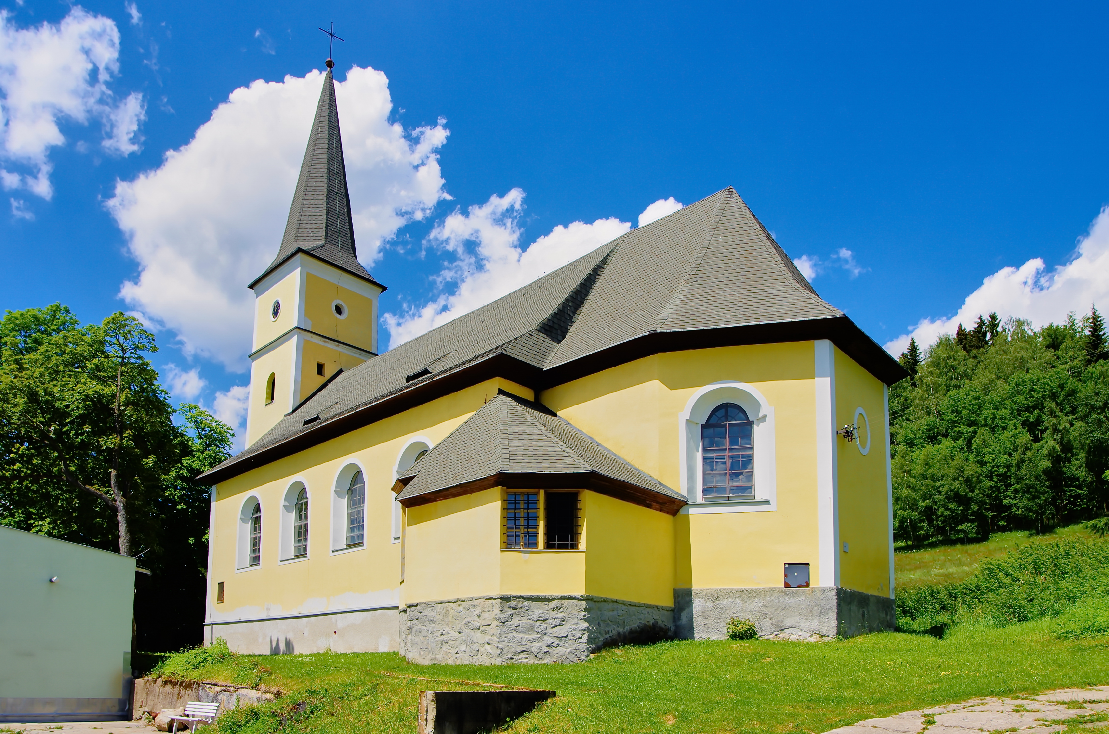 Kostel Navštívení Panny Marie, střed obce